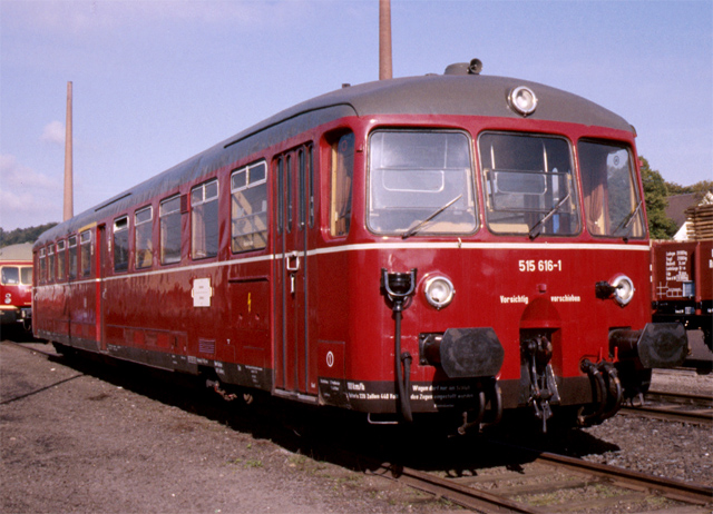 Deutsche Bundesbahn (DB) treinstel ETA150 616 op 12 oktober 1985 in Eisenbahnmuseum Bochum-Dahlhausen. Opgenomen tijdens de tentoonstelling 150 jaar spoorwegen in Duitsland